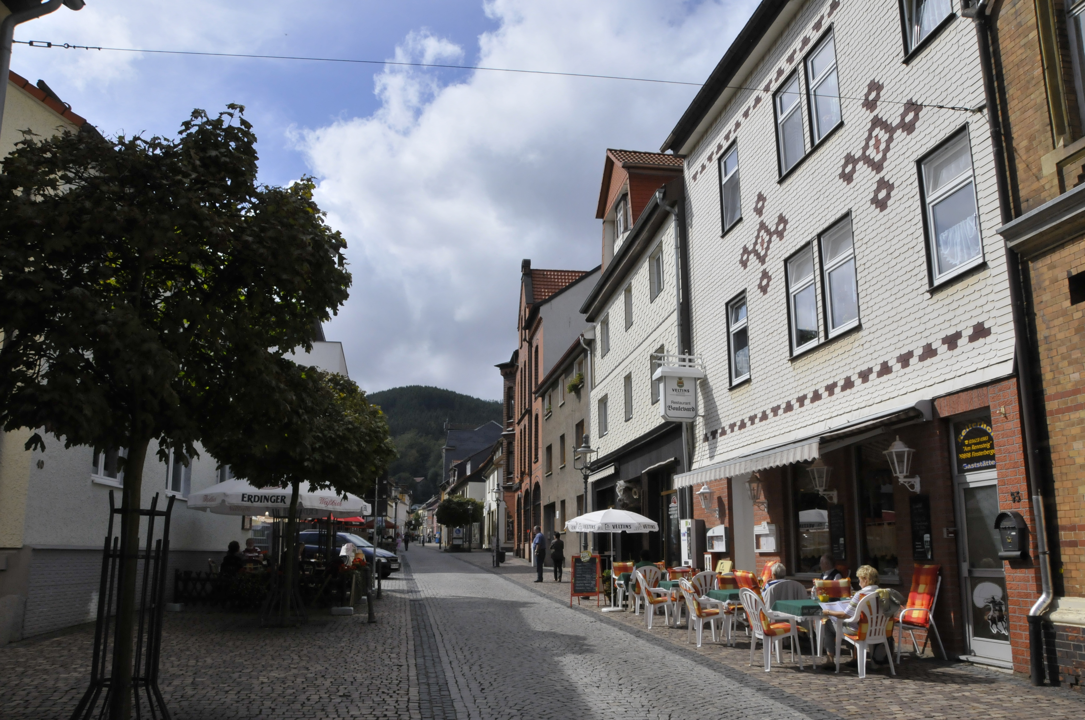 Friedrichroda, Hauptstraße